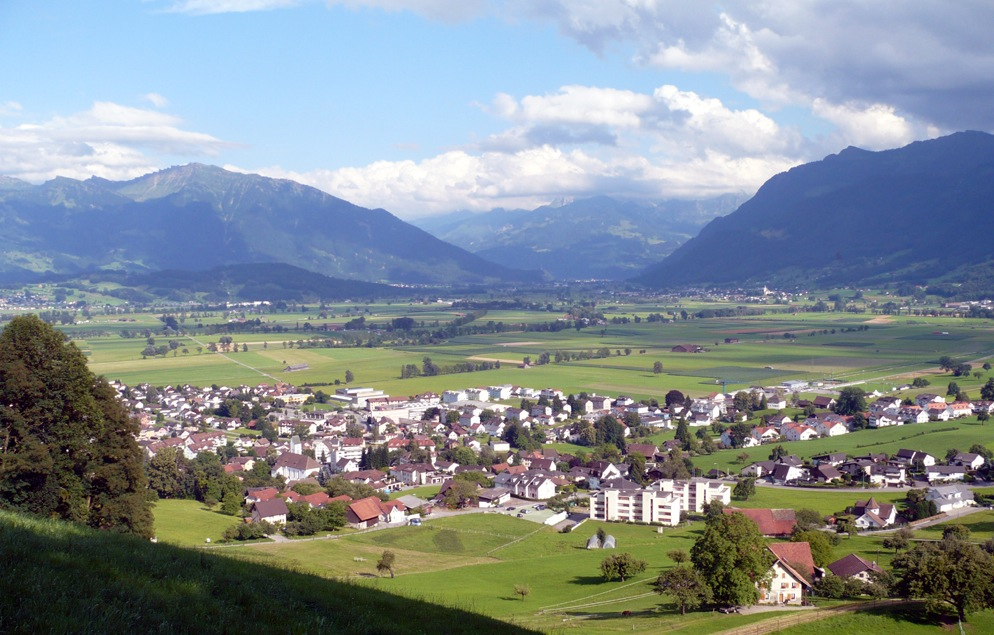 Tuggen SZ, Blick nach Südosten Richtung Walensee